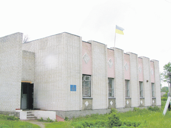 с. Обтове, Приміщення сільської ради.